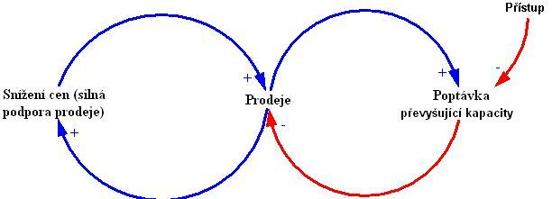 upravený obrázek z dokumentu